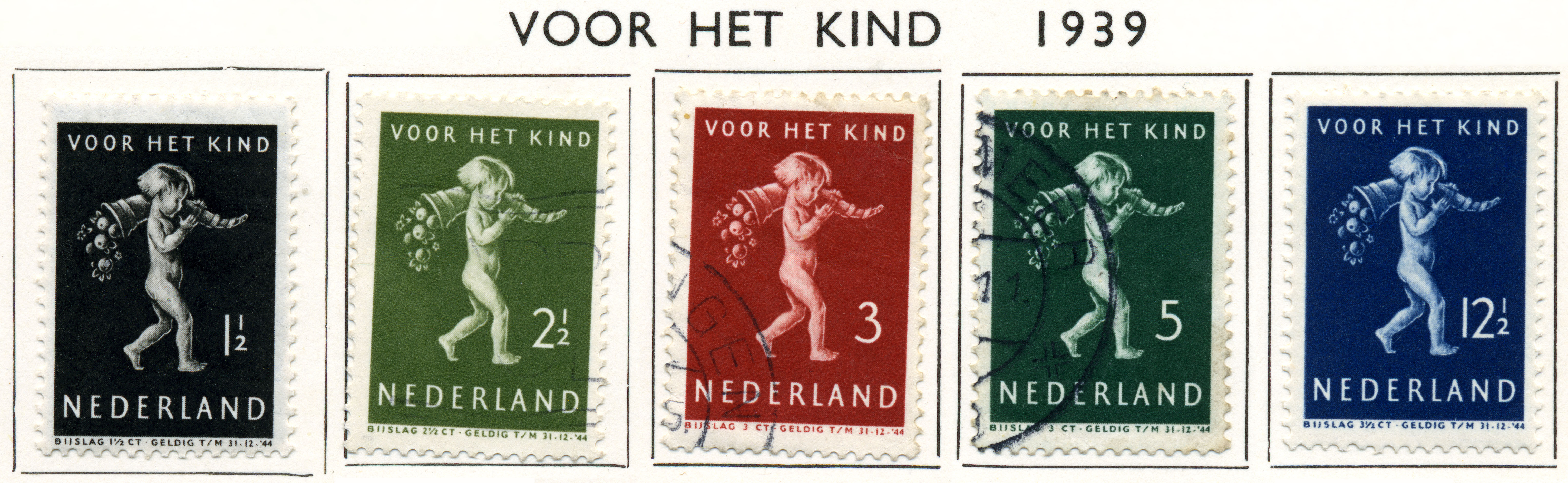 Kinderzegels (1939). Kind met hoorn der overvloeds. Uitgegeven met toeslag voor de kinderbescherming. NVPH nr 327-331. Ontwerper Sierk Schröder